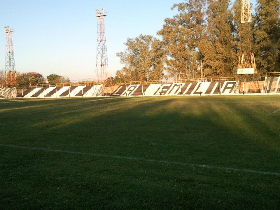 safdsfsa